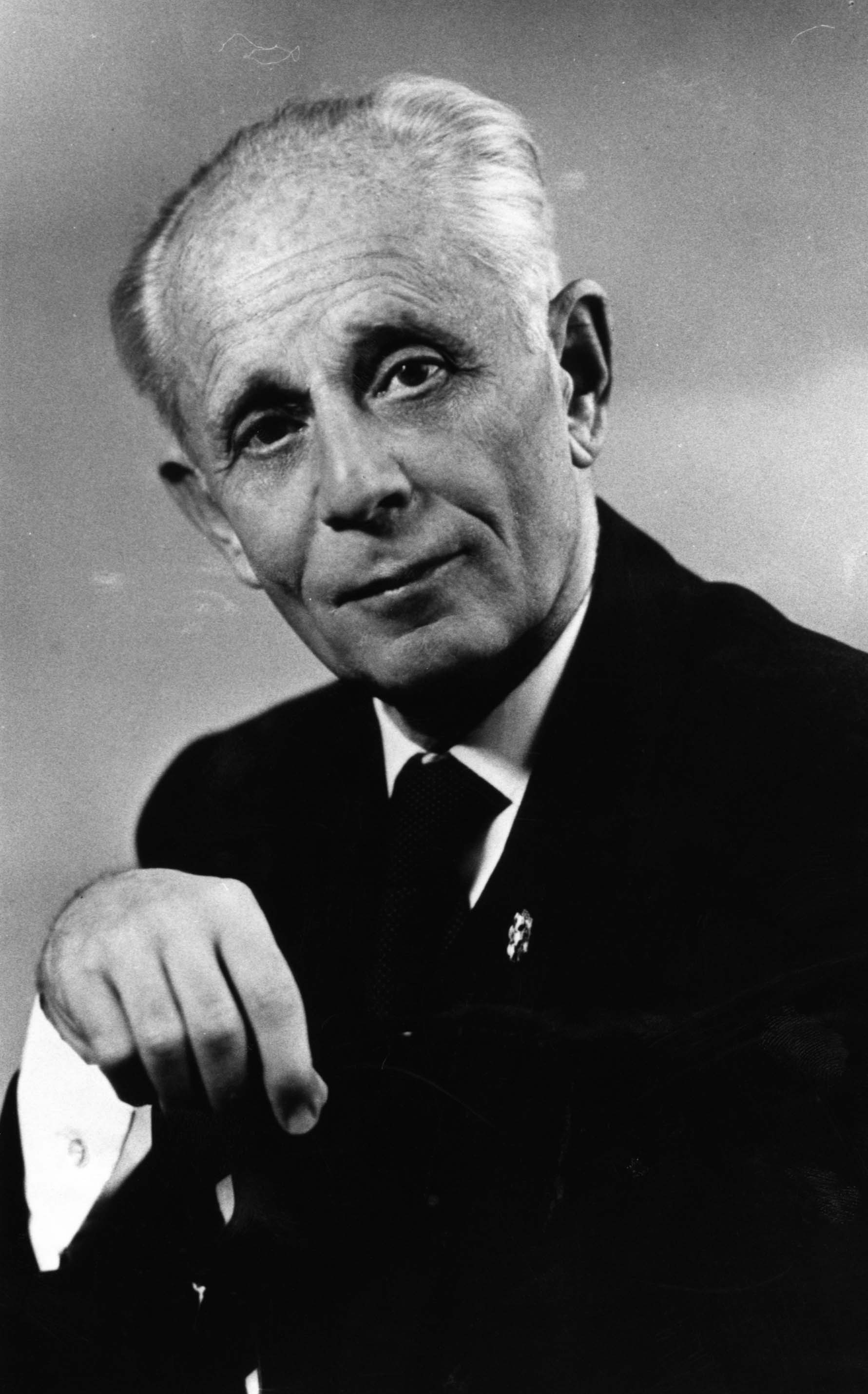 Portrait photographique d’Hans Selye, professeur émérite à l’Université de Montréal.